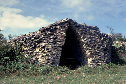 Cabane en pierre sèche à Ausseing (Haute-Garonne)